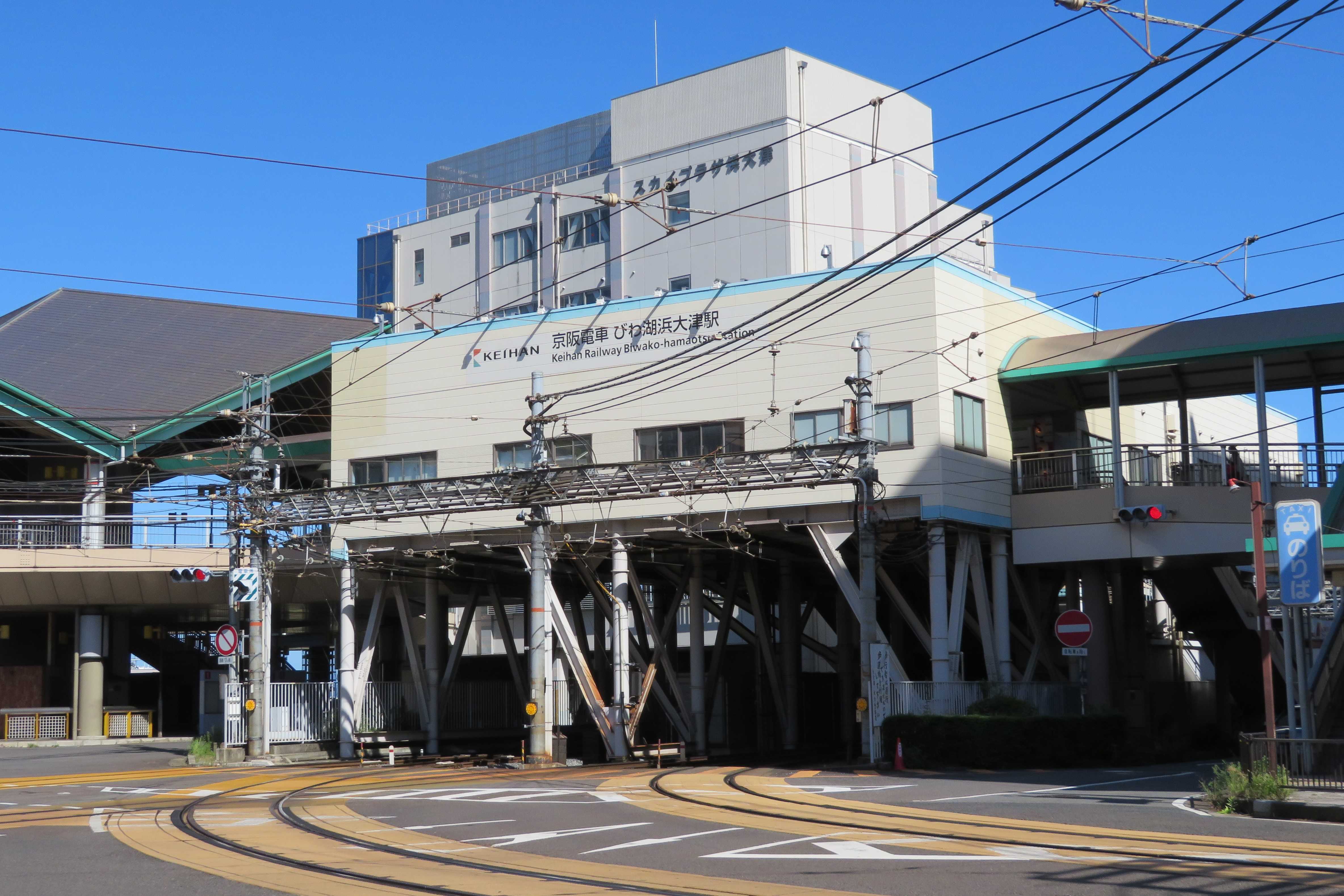 京阪電鉄びわ湖浜大津駅